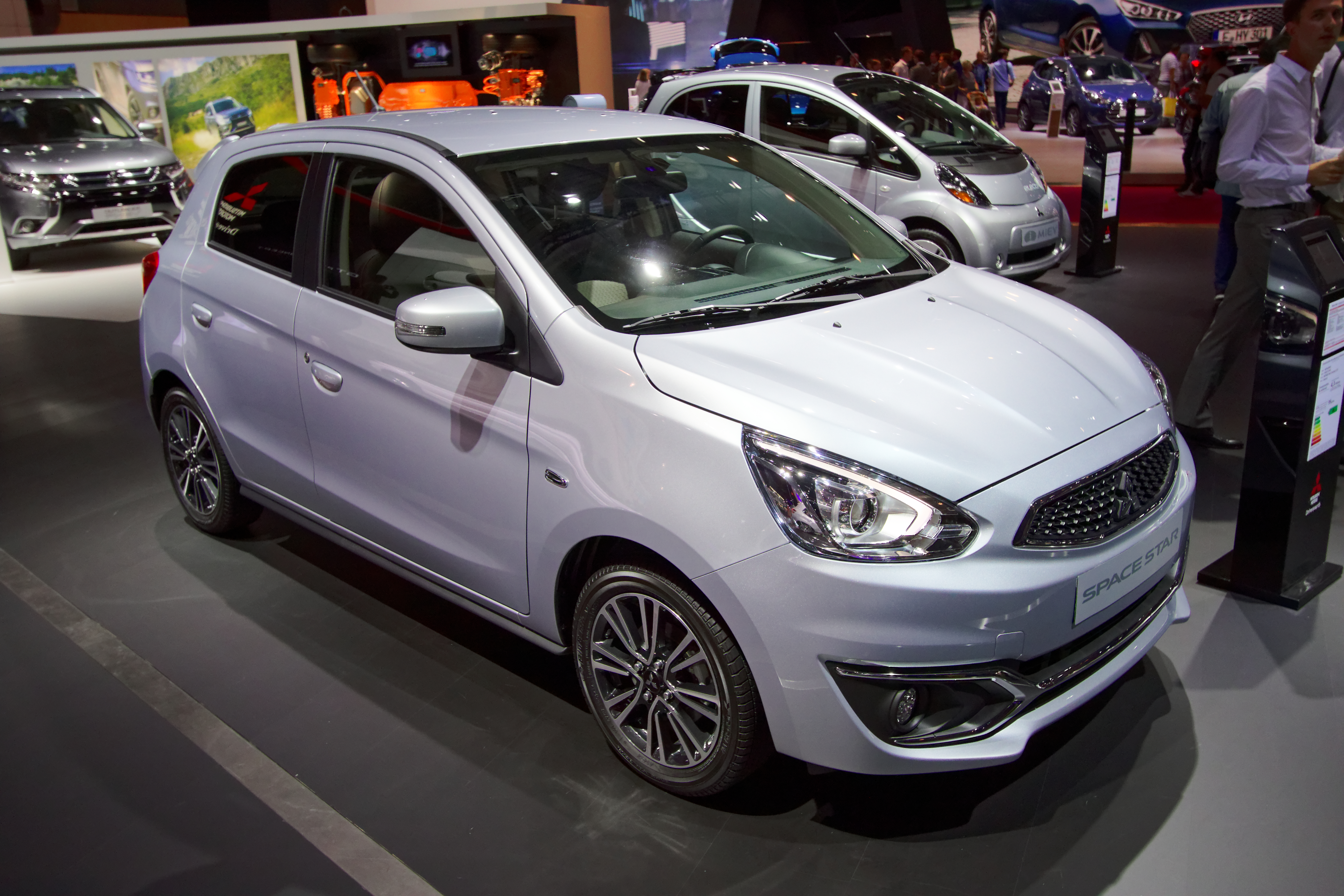 Une Mitsubishi Space Star présentée lors du mondial de l'automobile de Paris 2016.